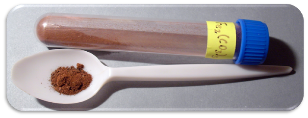 Uhličitan železitý - Fe2(CO3)3